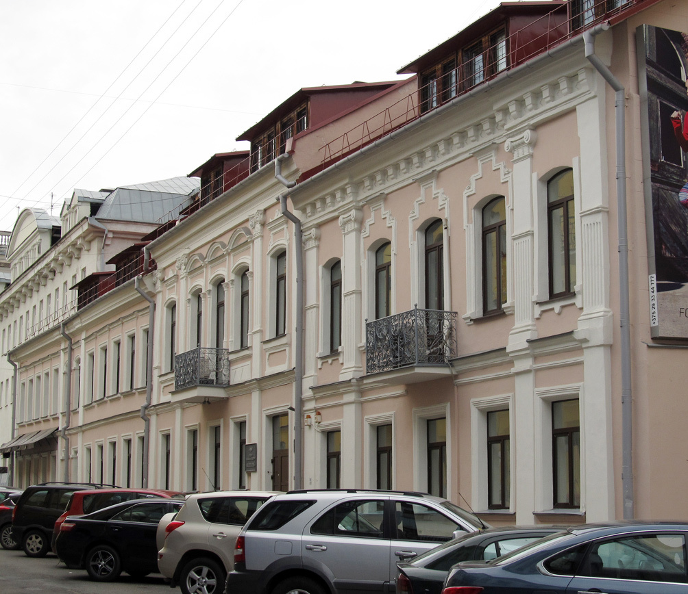 Мінск. Вуліца Інтэрнацыянальная, 5